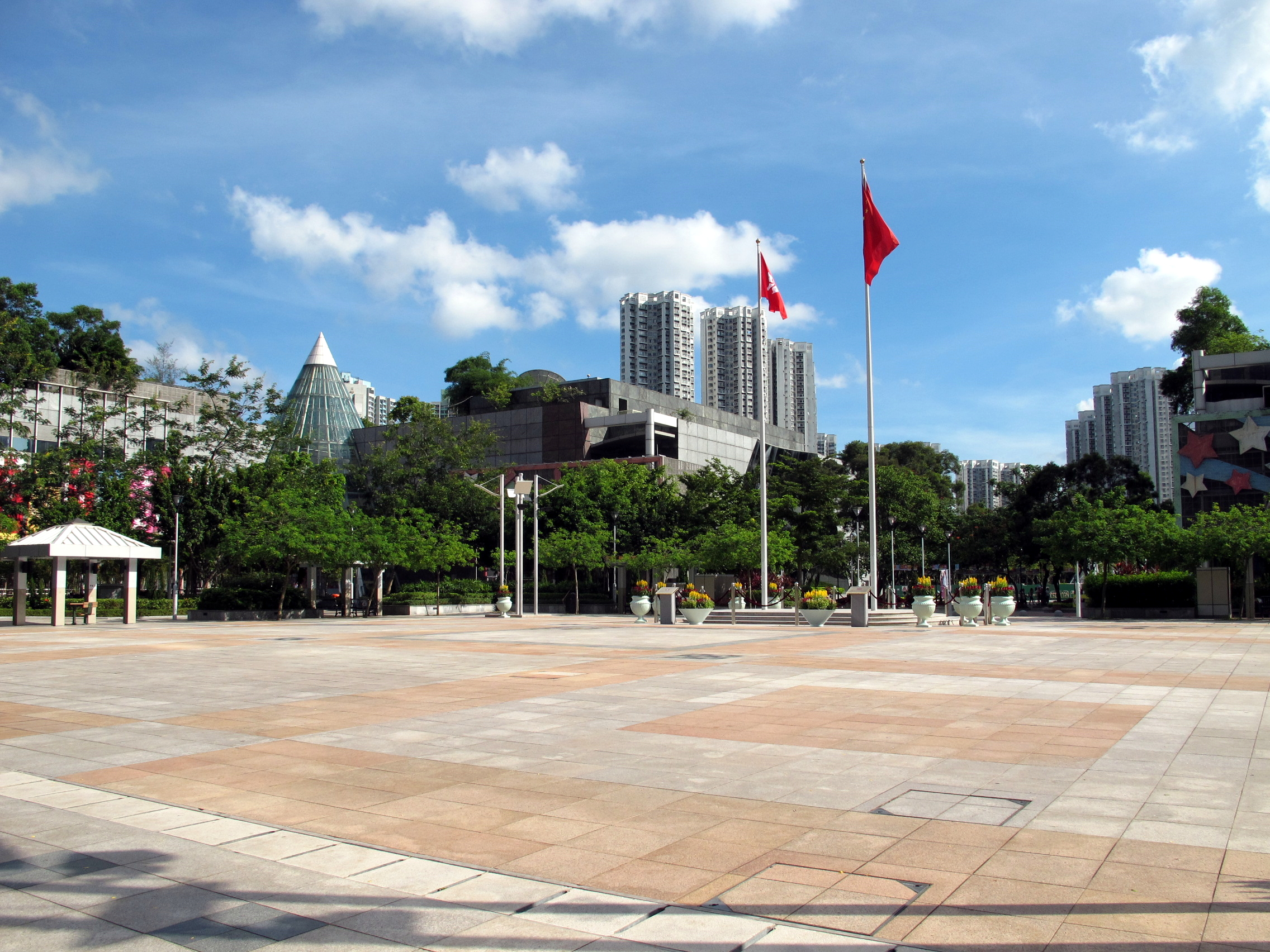 Tin SHui Wai Kingswood Ginza 天水圍 嘉湖銀座